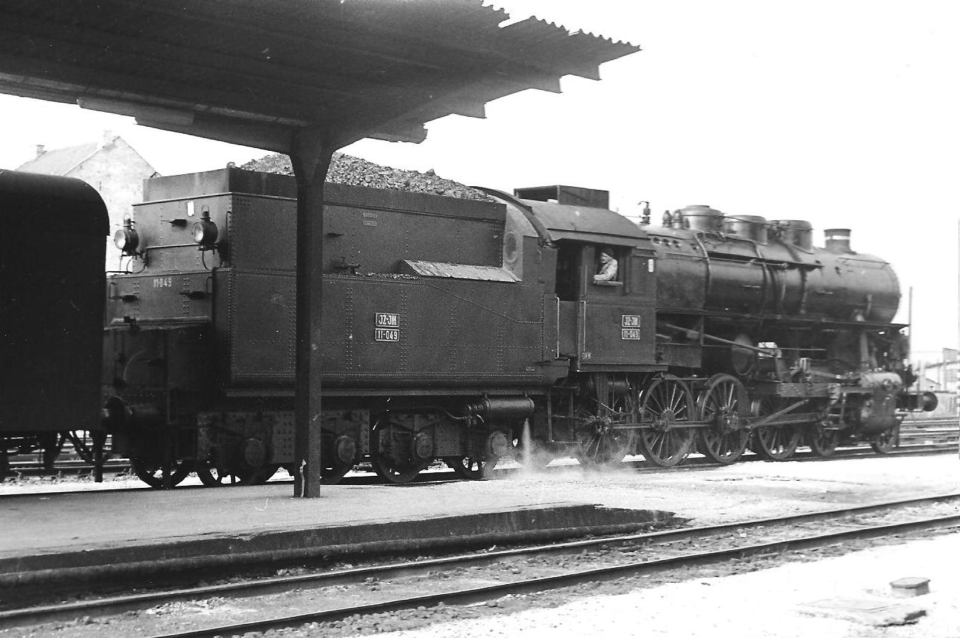 2D Schlepptenderlokomotive der JZ BR 11-049 in Zagreb